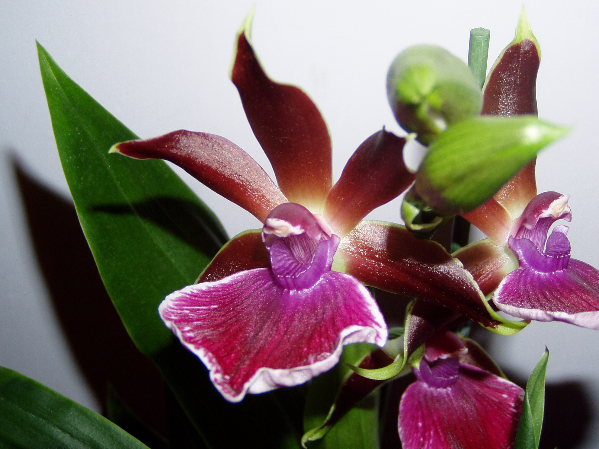 photo d'un Zygopetalum - cultivar (orchidée)